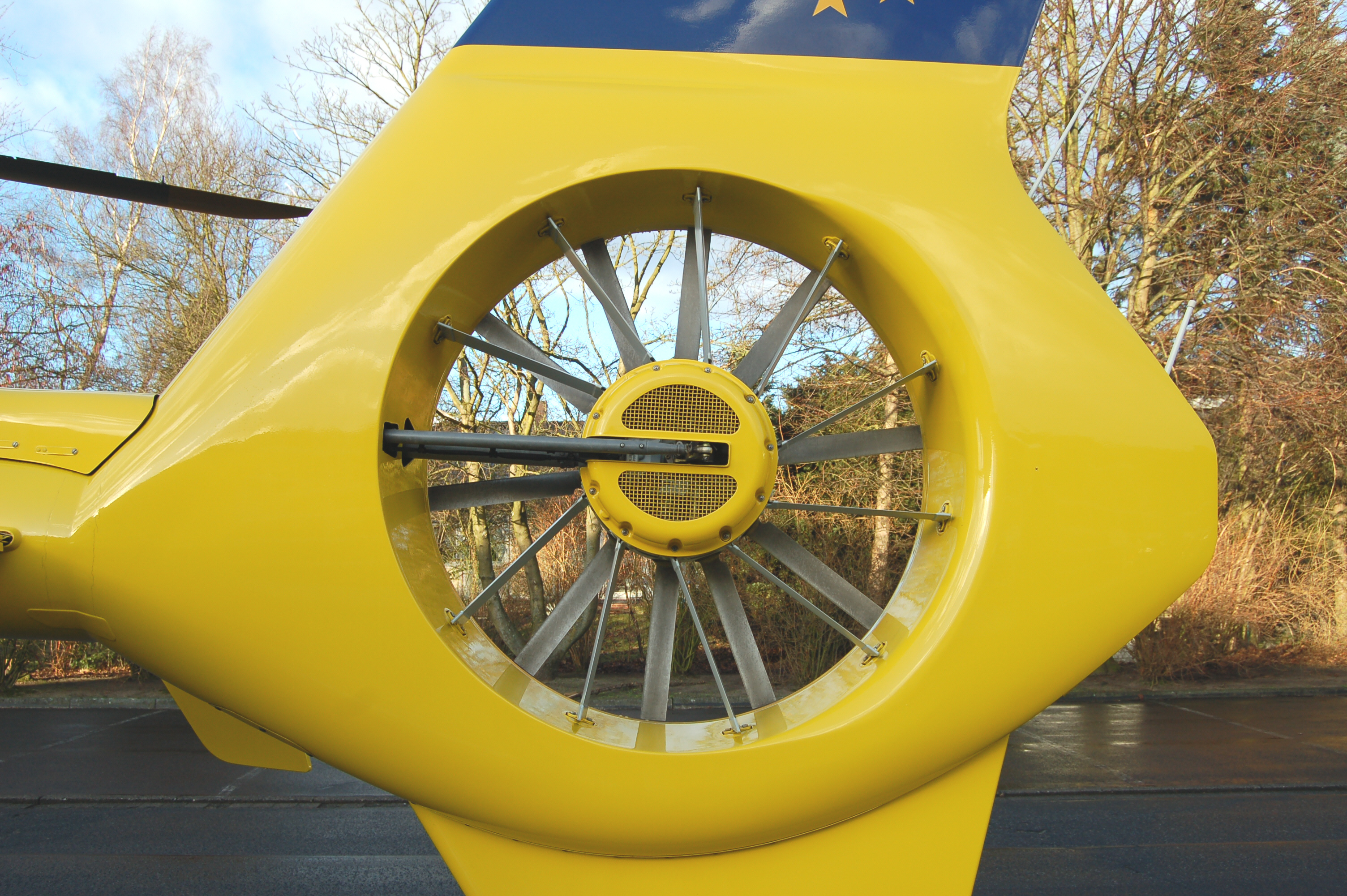 Rotor des Rettungshubschrauber 'Christoph Hansa' (seit 20.06.2007 stationiert in Hamburg) Kennung: D-HHBG